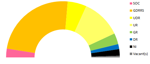 Répartition des sénateurs suivant leur groupe parlementaire après les élections sénatoriales de 1929.